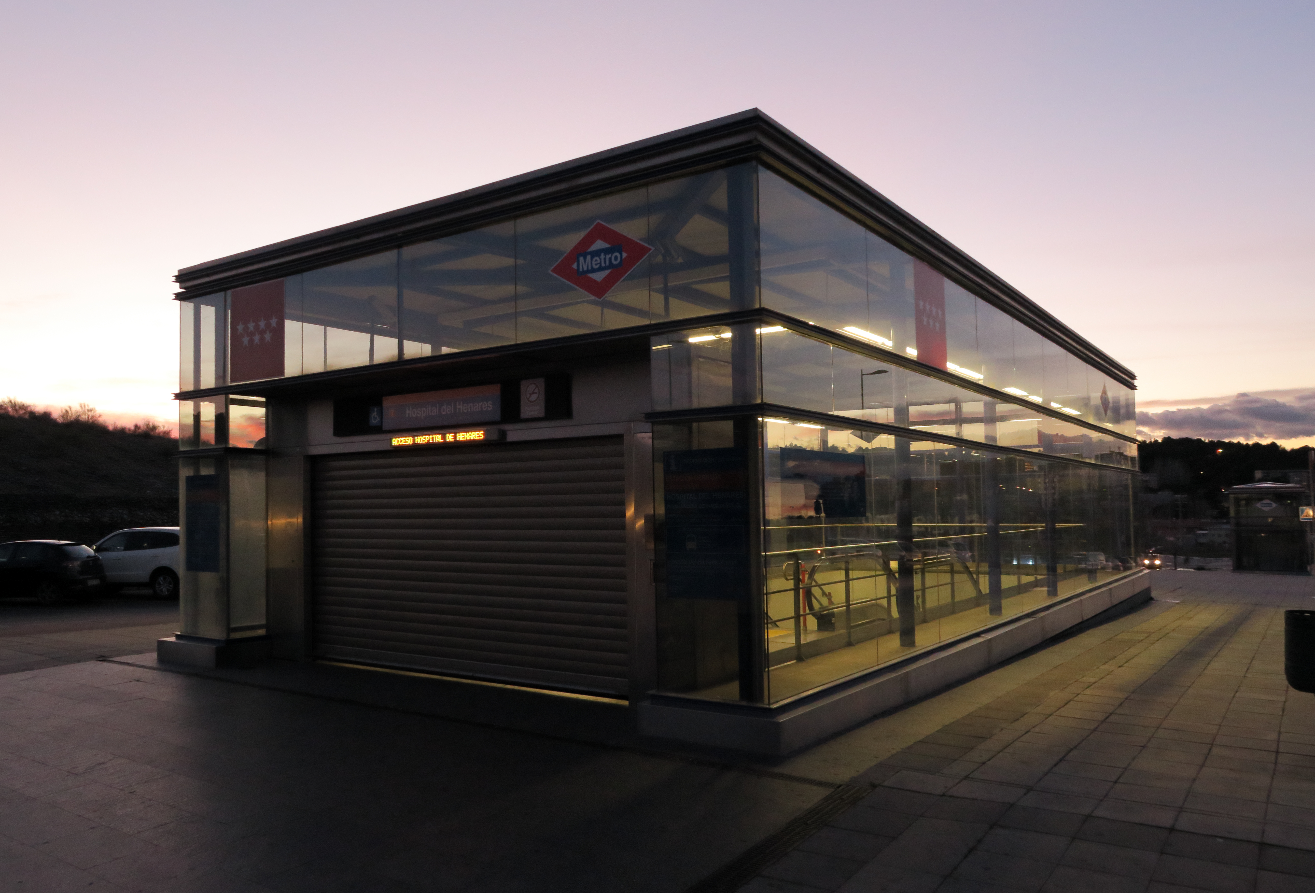 Estación de Hospital del Henares